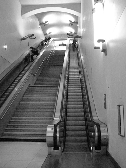 BFM metro escalator, Paris.